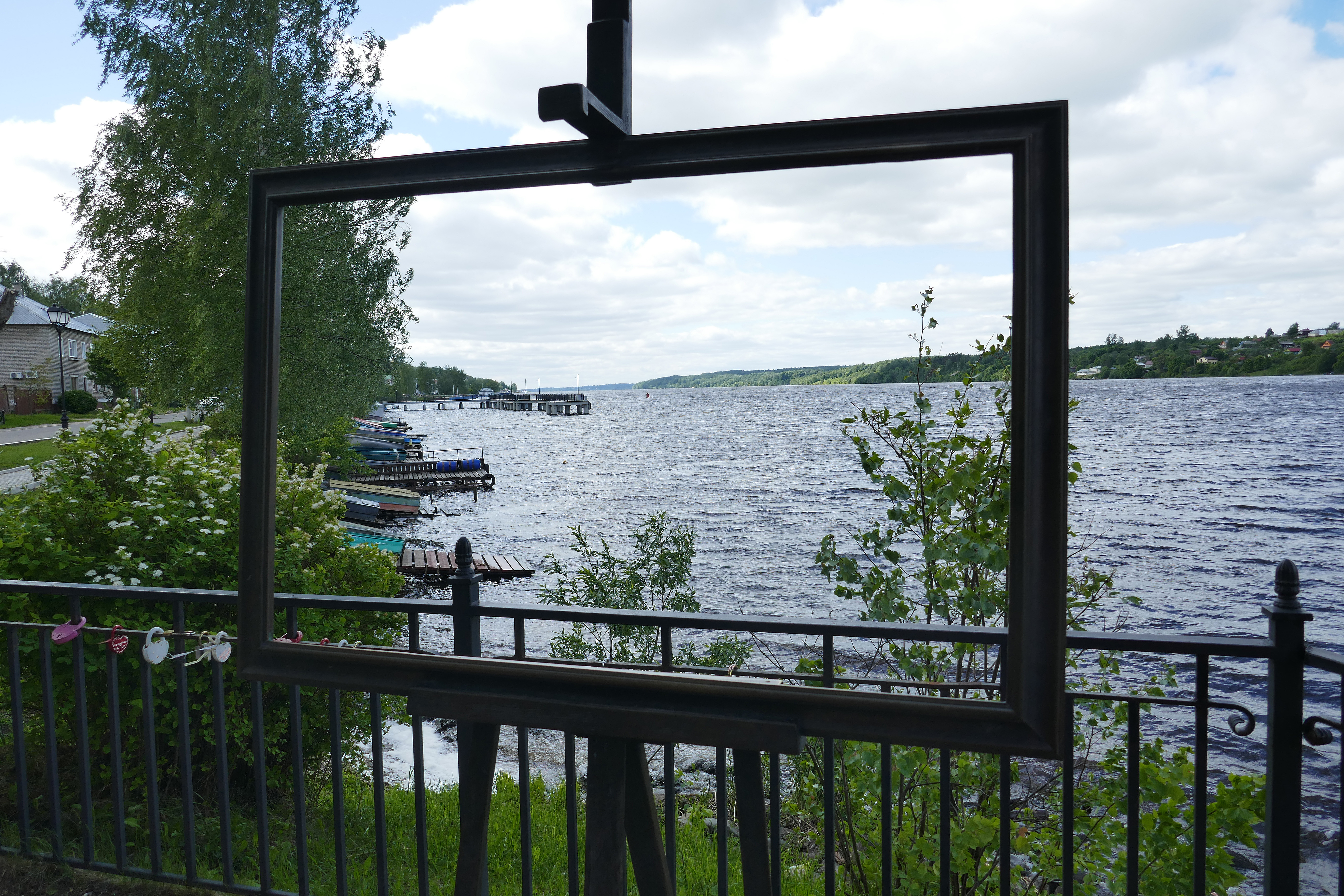 Plyos (Oblast d'Ivanovo) : chevalet au bord de la Volga, cadrant le paysage qui inspira de nombreux peintres, dont Isaac Levitan.